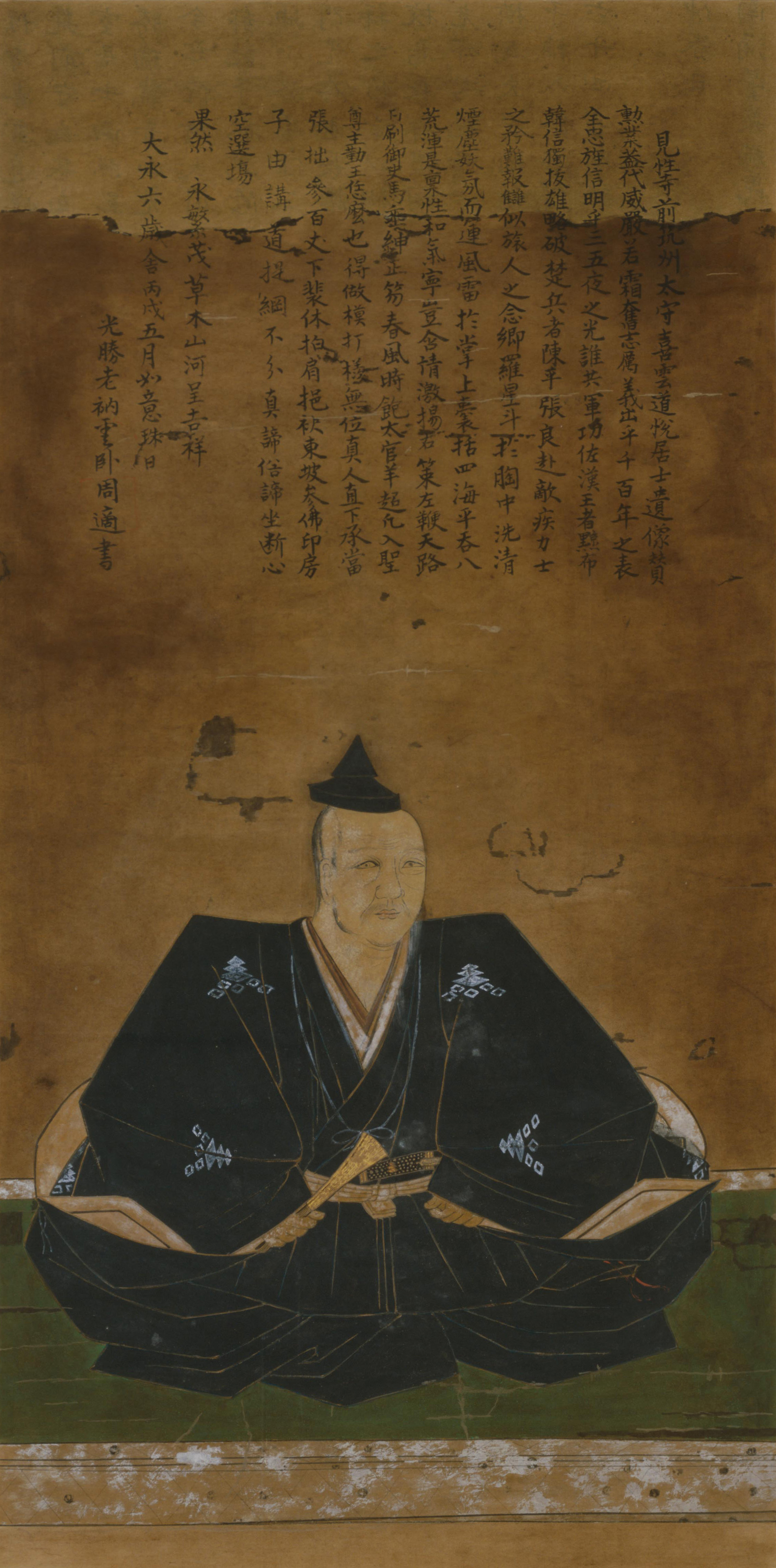 三好長輝画像